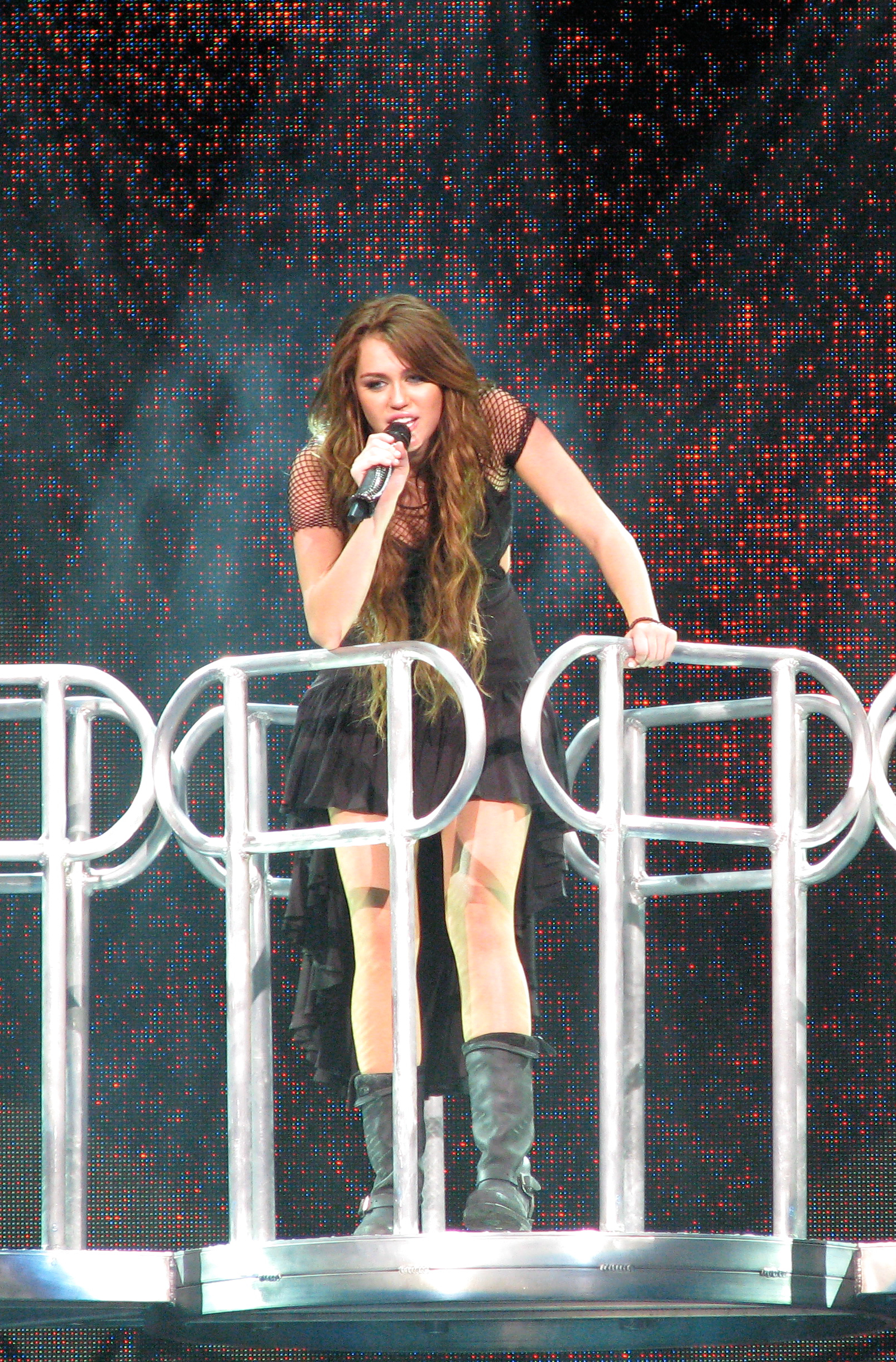 Miley Cyrus Miley Cyrus Canta uma música num festival.